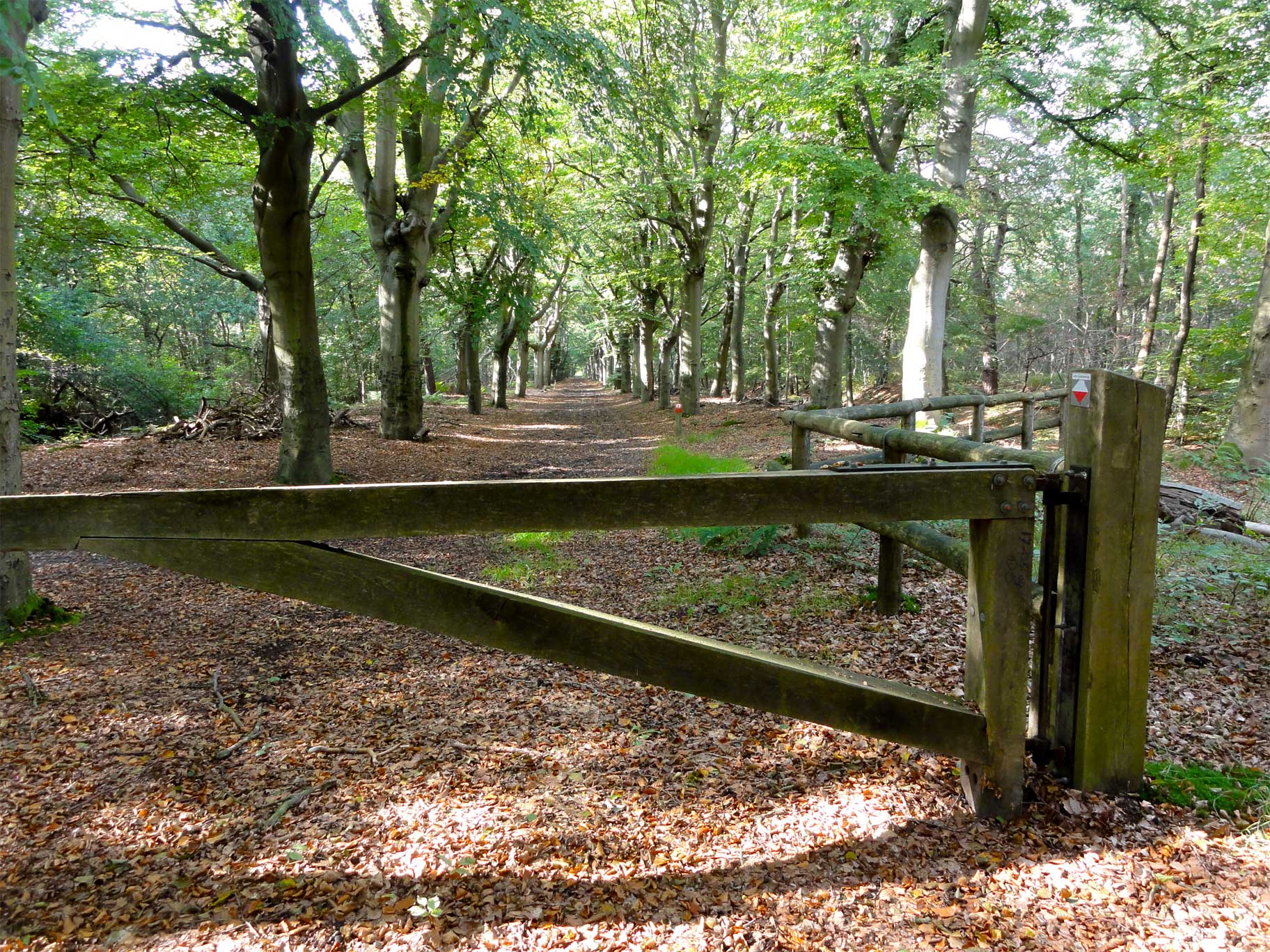 Boekesingel in het Lycklamabos, gezien in noordwestelijke richting naar de zijde van de Kippenburg